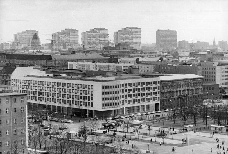 Berlin, Ministerium für Volksbildung ADN-ZB Reiche 13.3.90 Berlin: Blick vom Reichstag auf das Ministerium für Volksbildung im Ostteil der Stadt.Unter den Linden,Ecke Otto-Grotewohl-Str.